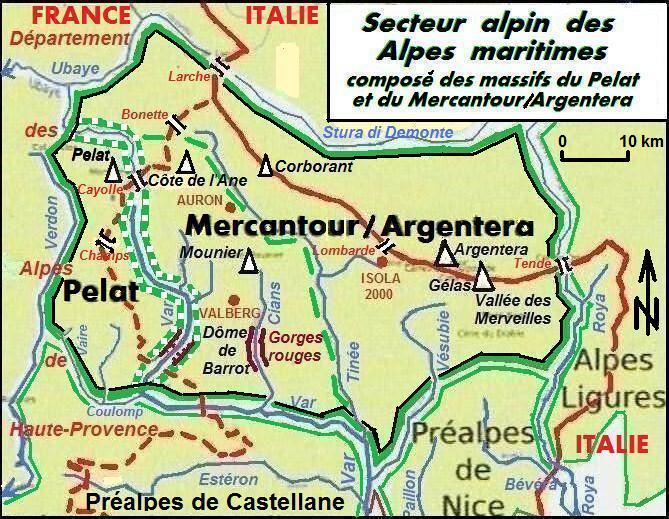 Secteur alpin des Alpes maritimes composé des deux massifs (1) du Pelat entre Var et Verdon à l'ouest et (2) du Mercantour/Argentera au sens large incluant la chaîne de la "Côte de l'Ane - Mounier" (avec le dôme de Barrot). Réalisation André Payan-Passeron - diplômé d'études supérieures de géographie - à partir d'un extrait de la carte "Massifs des Alpes.png" de Wikimédia Commons réalisée les 11/09/2006 et 04/01/2007 par Lango puis par Gemini 1980.